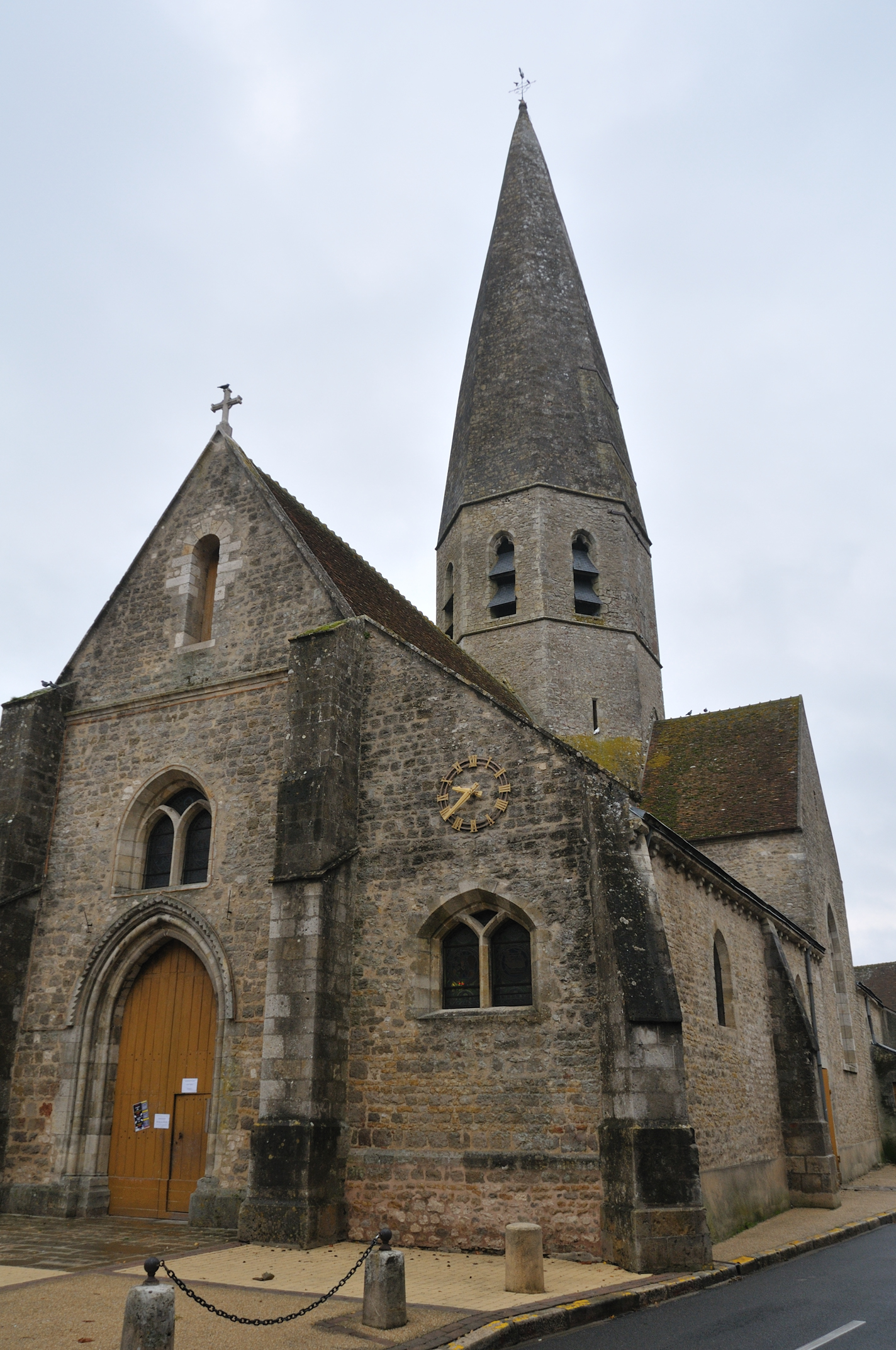 Église Notre-Dame, Fay-aux-Loges, Loiret, France